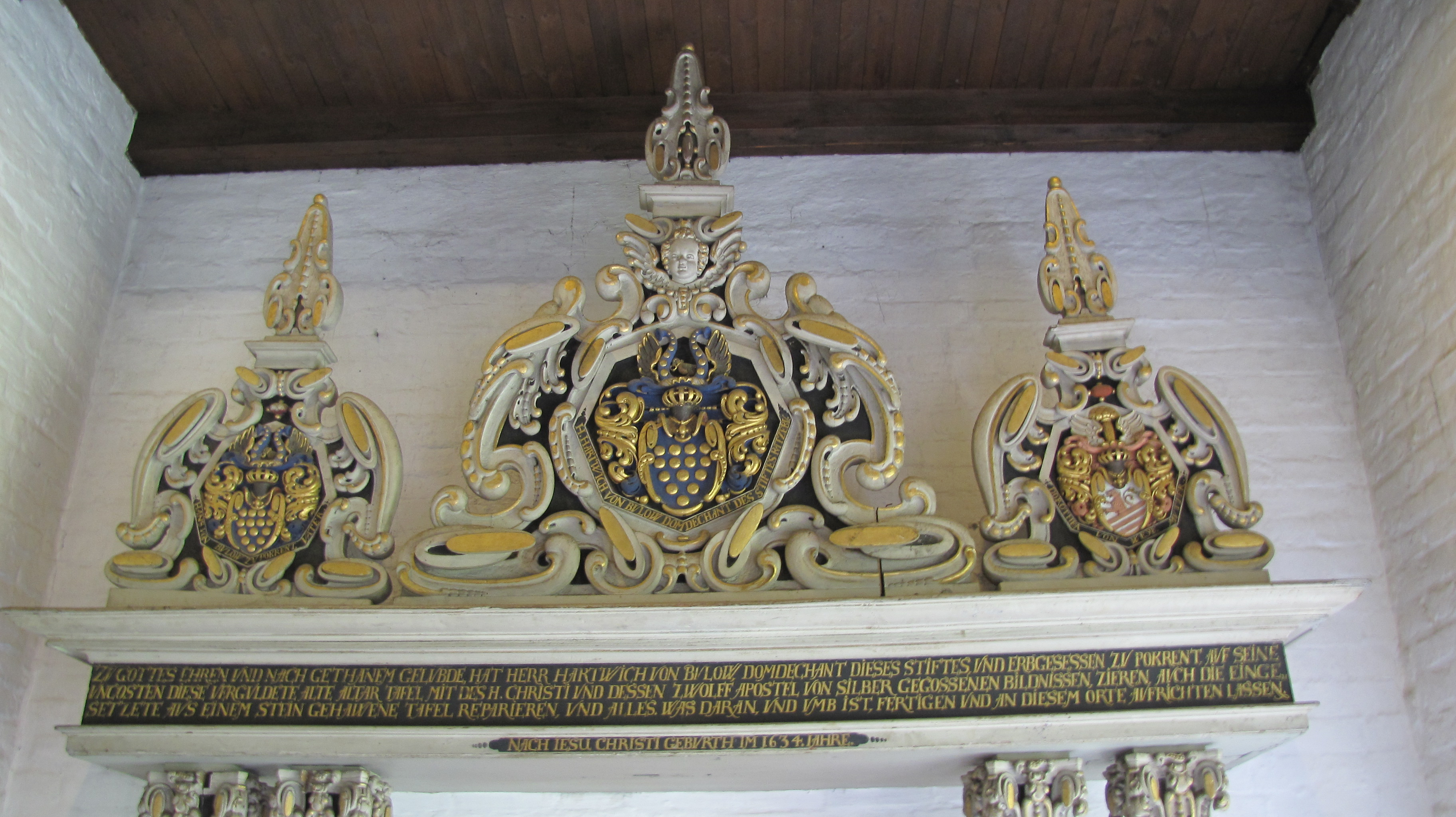 Aufsatz für den gotischen Hochaltar im Ratzeburger Dom, 1634 gestiftet von Domdechant Hartwig von Bülow mit seinem Wappen und denen seiner Eltern, seit den 1960er Jahren getrennt, in der Kunstkammer ausgestellt